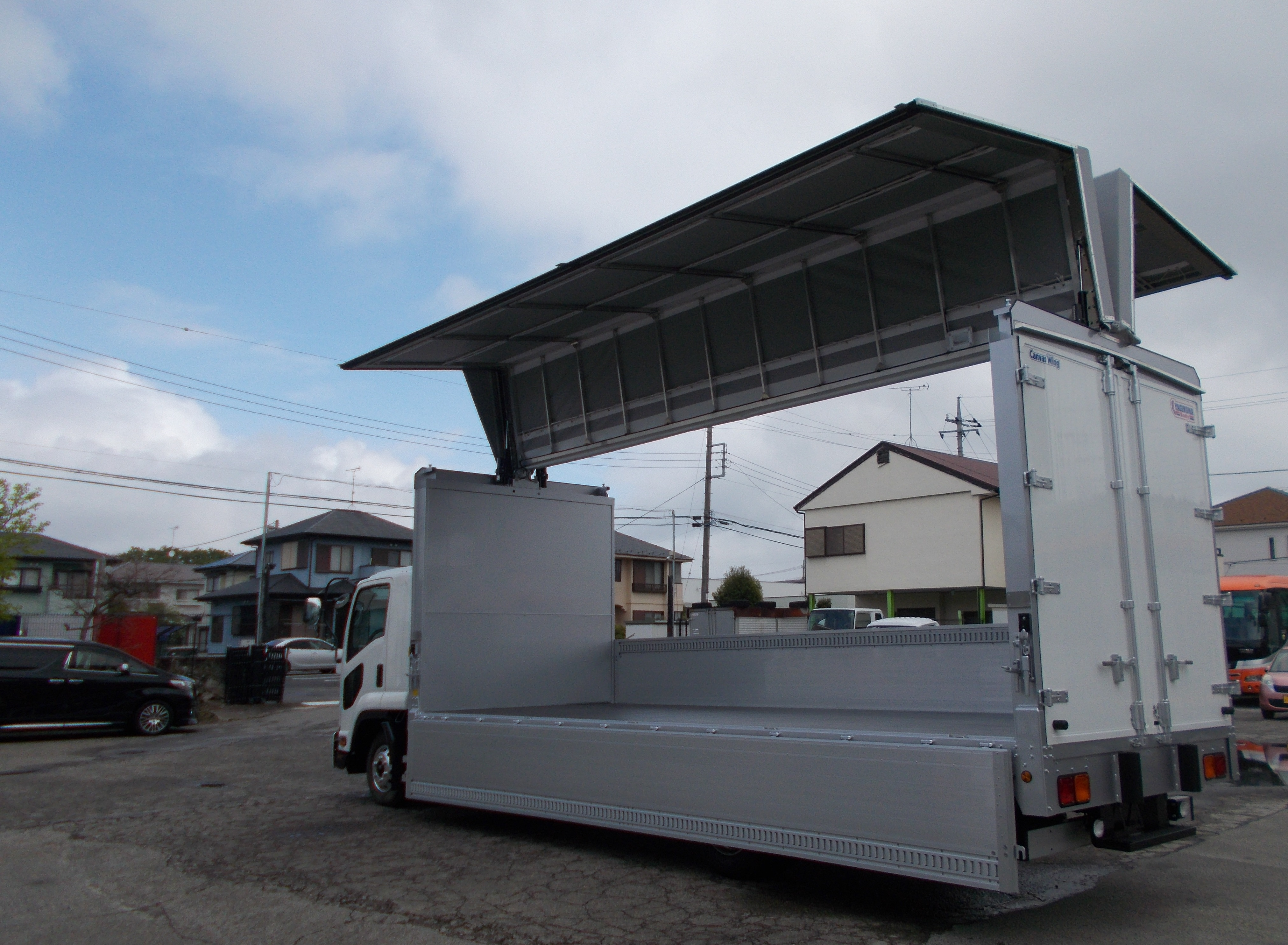 キャンバスウィング後部からの写真です